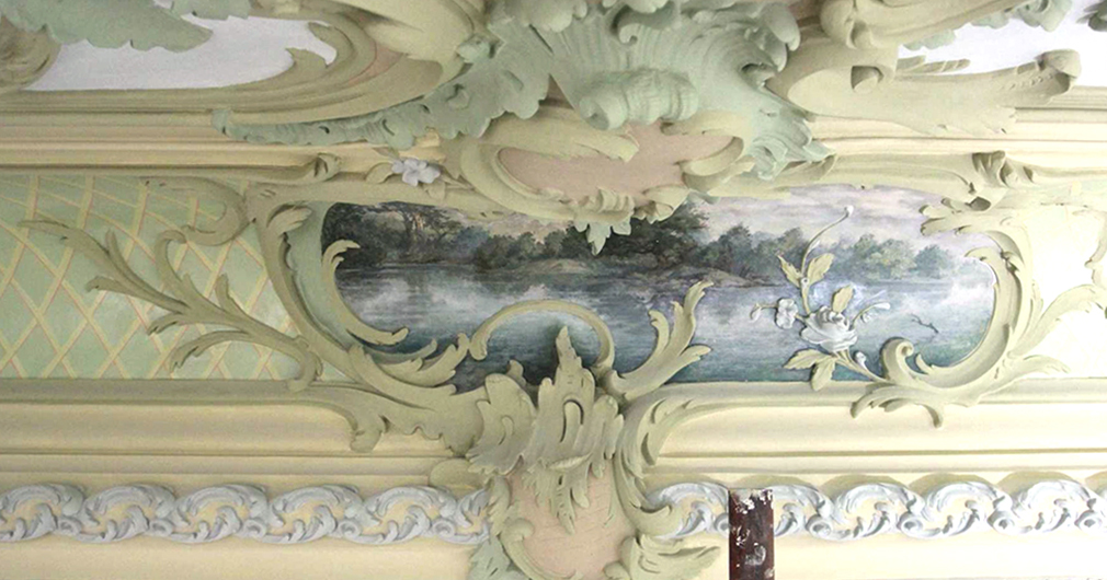 Элемент отделки интерьера особняка фон Рекк по адресу ул. Пятницкая, 64)